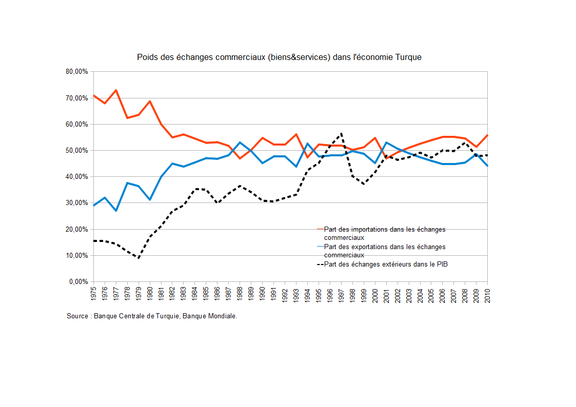 Poids des échanges extérieurs dans l'économie turque - Source: Banque Centrale de Turquie, Banque Mondiale.